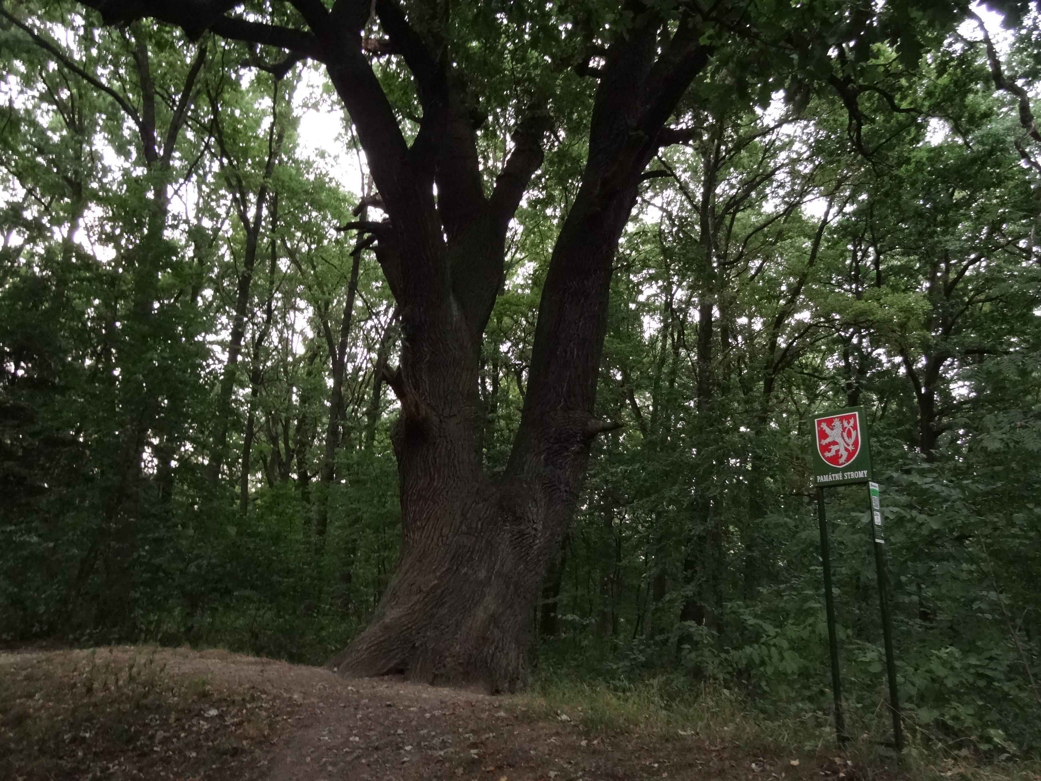 Praha-Újezd nad Lesy - památné duby letní na hrázi rybníka Homolka v Milíčovském lese